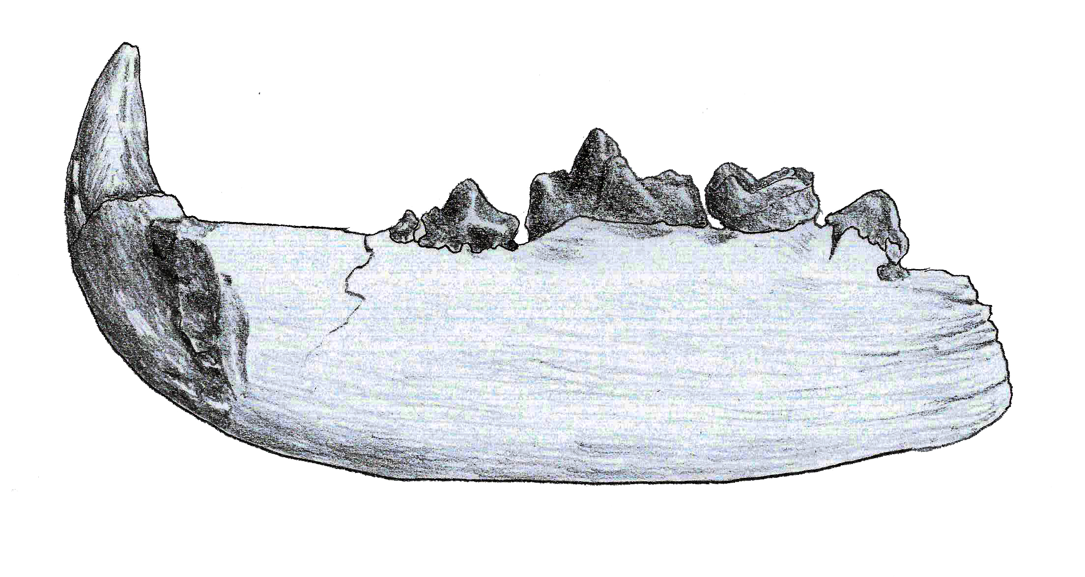 Pseudocyon mandible